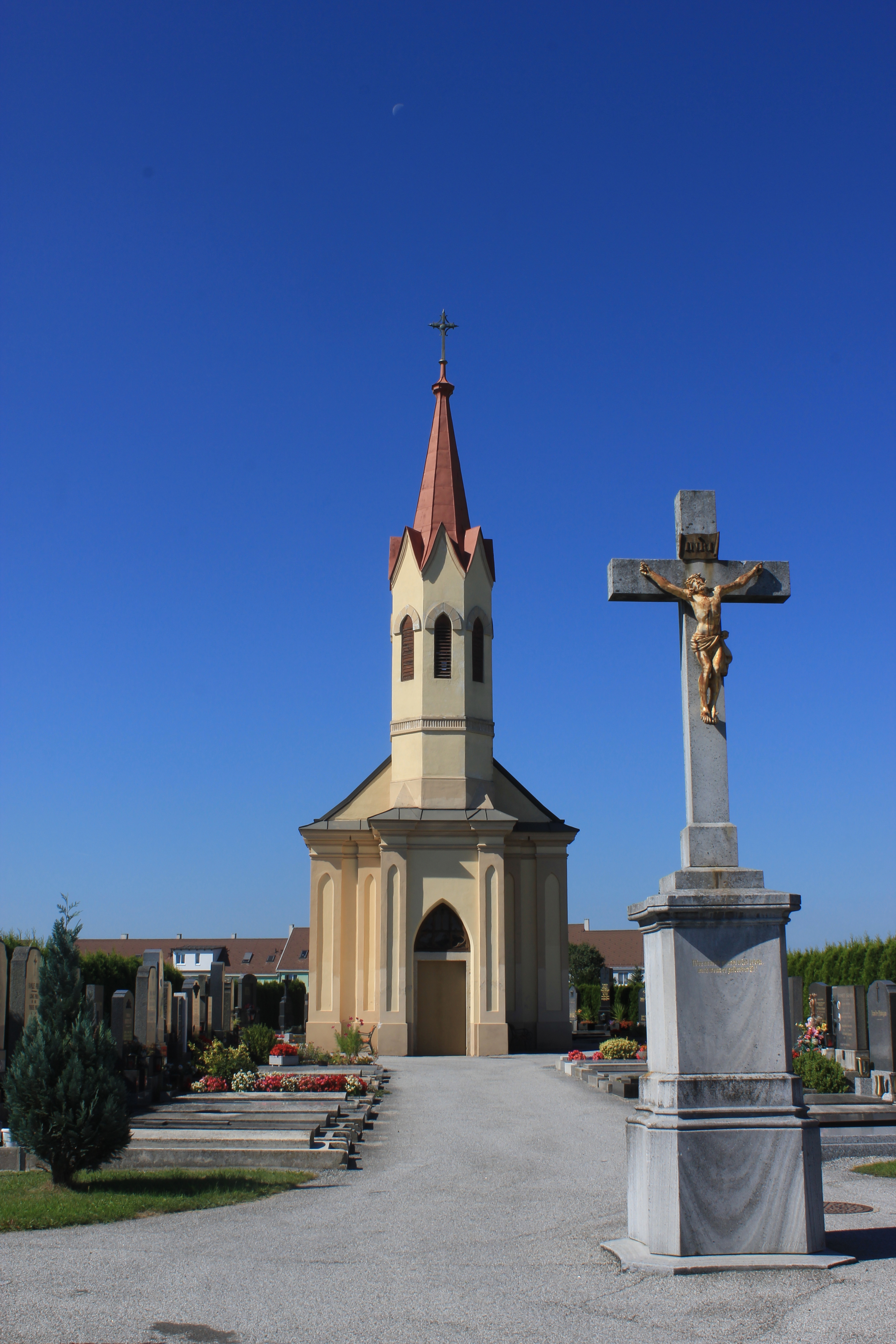 Friedhofskapelle, Ansicht mit Kreuz